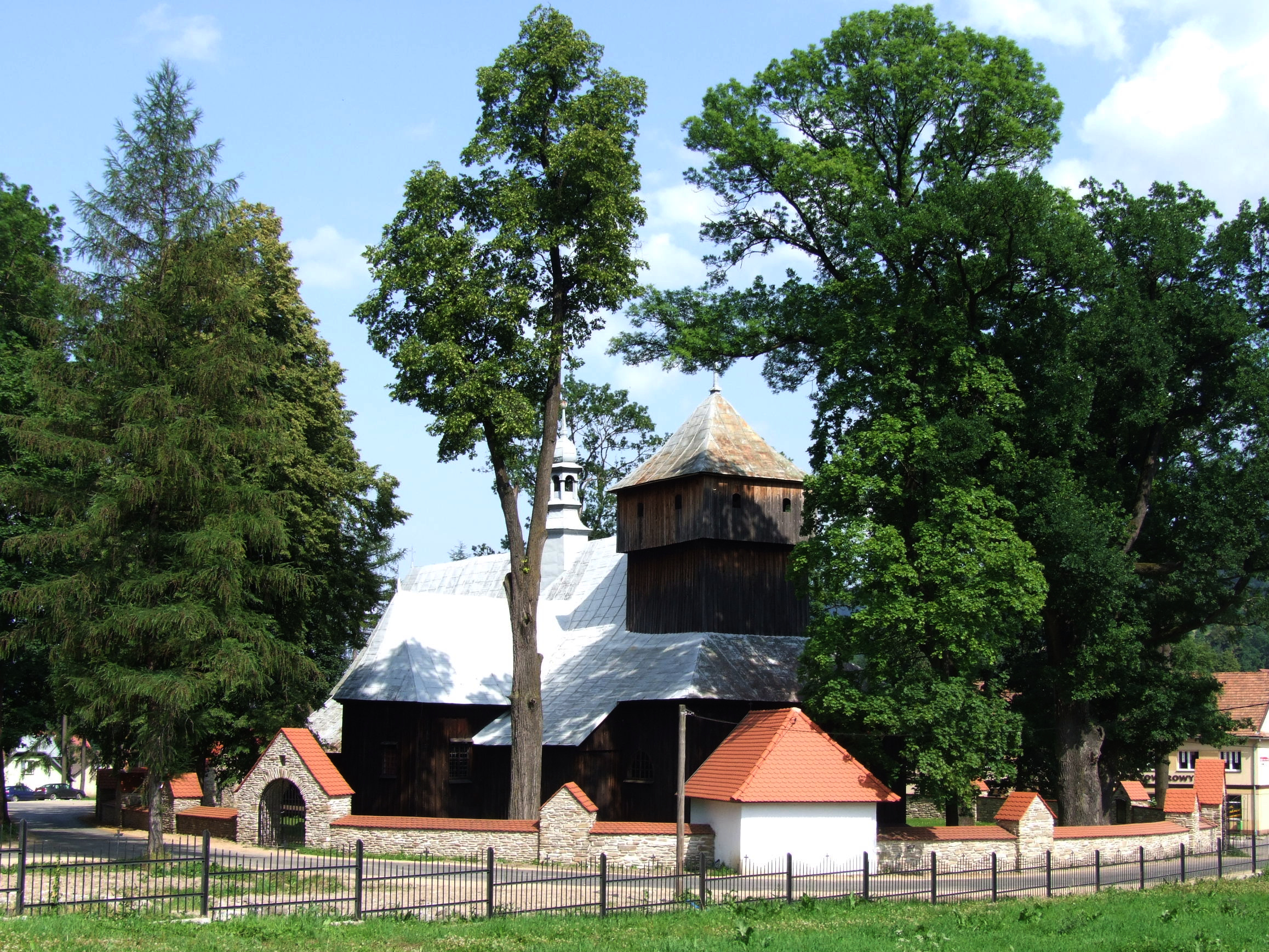 Kościół w Dobrej (stary)